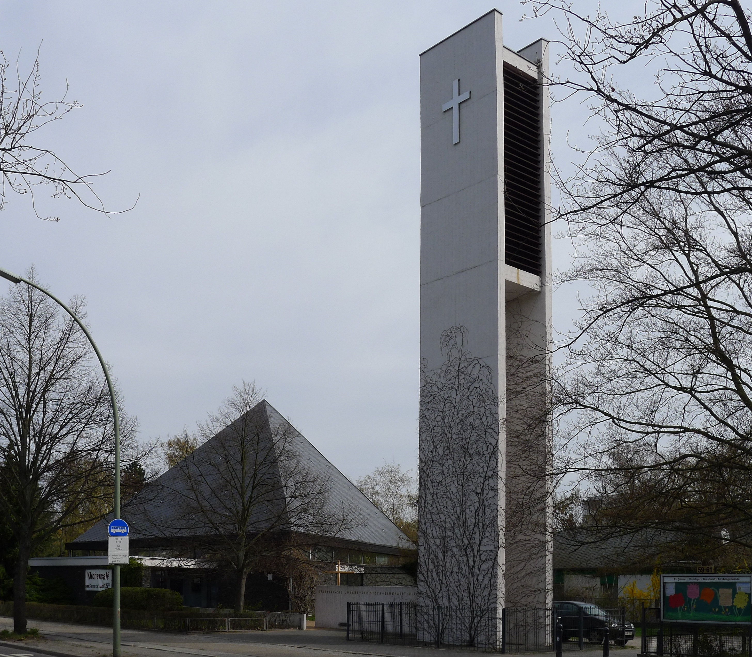 Campanile mit Kirche